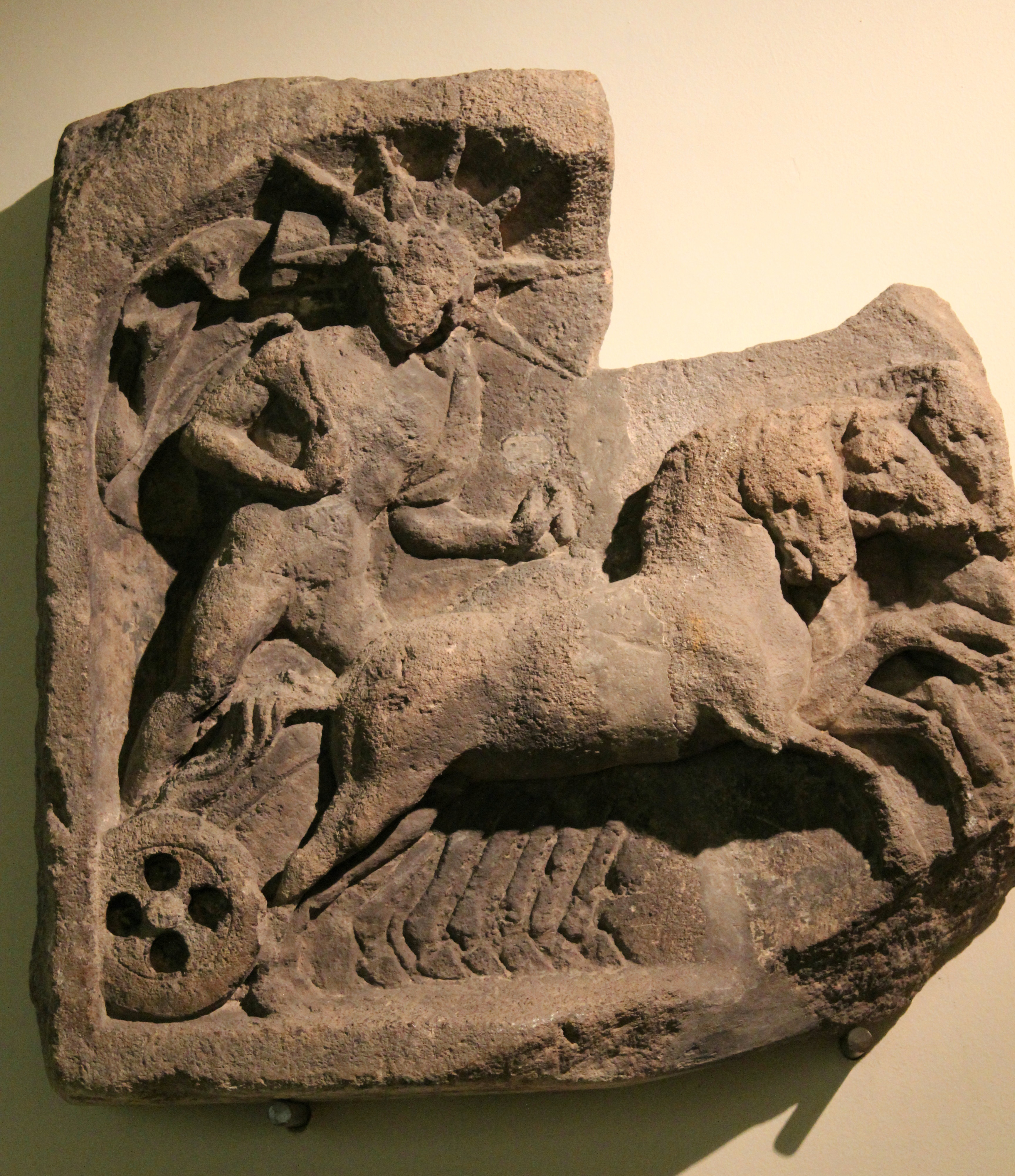 Relief en calcaire représentant le dieu Hélios, conduisant le quadrige céleste, Provenance : Saint Mard, Virton, province du Luxembourg, Belgique. Musées royaux d'Art et d'Histoire, Bruxelles, Belgique